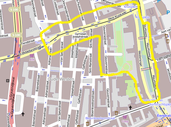 Geografie van dit gebied via